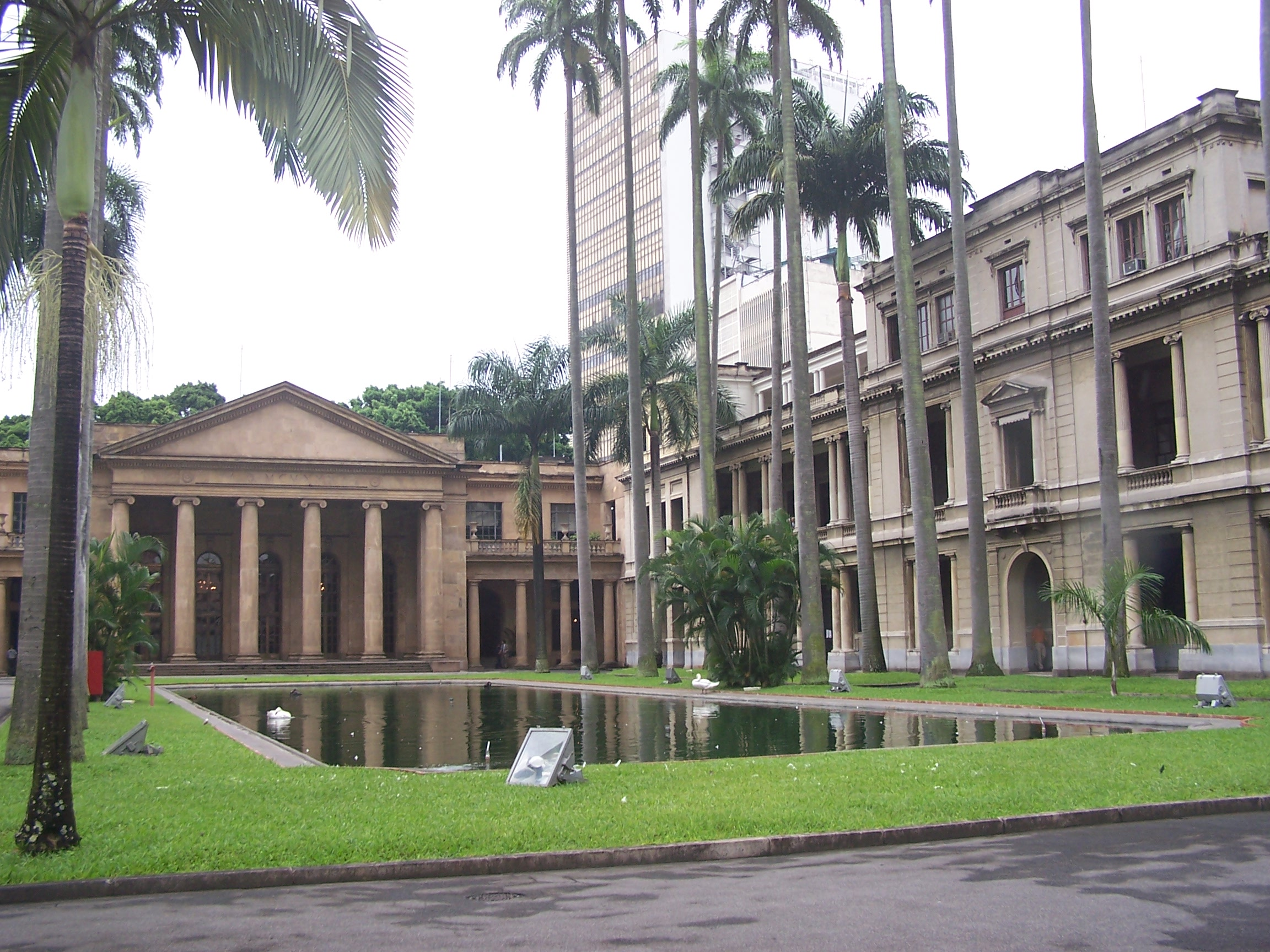 Palácio do Itamaraty in Rio de Janeiro, Brazil